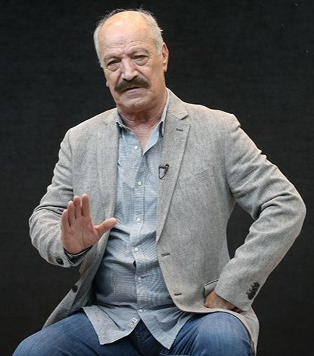 سعید راد - شهریور ۱۳۹۸